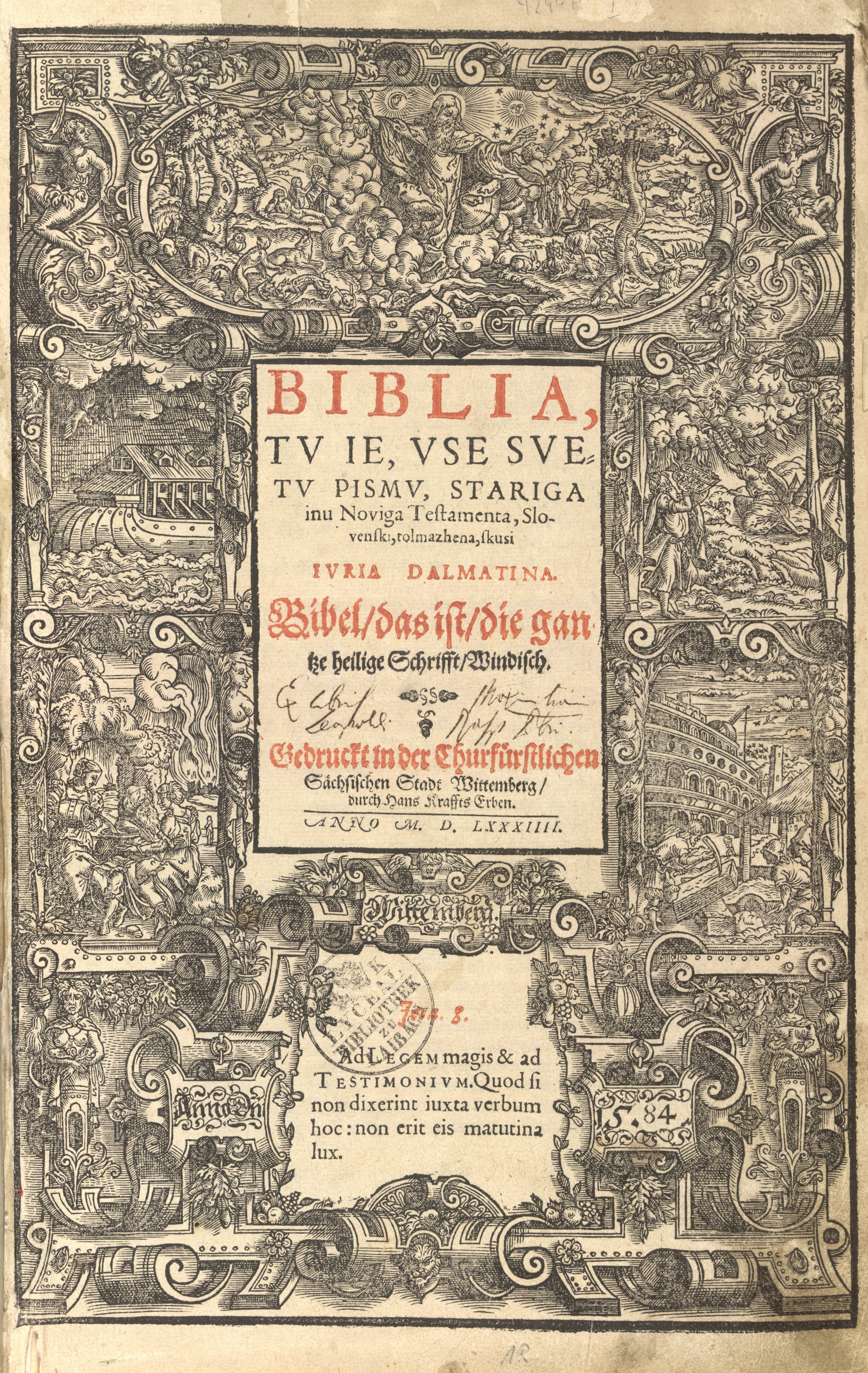 Dalmatinova Biblija.